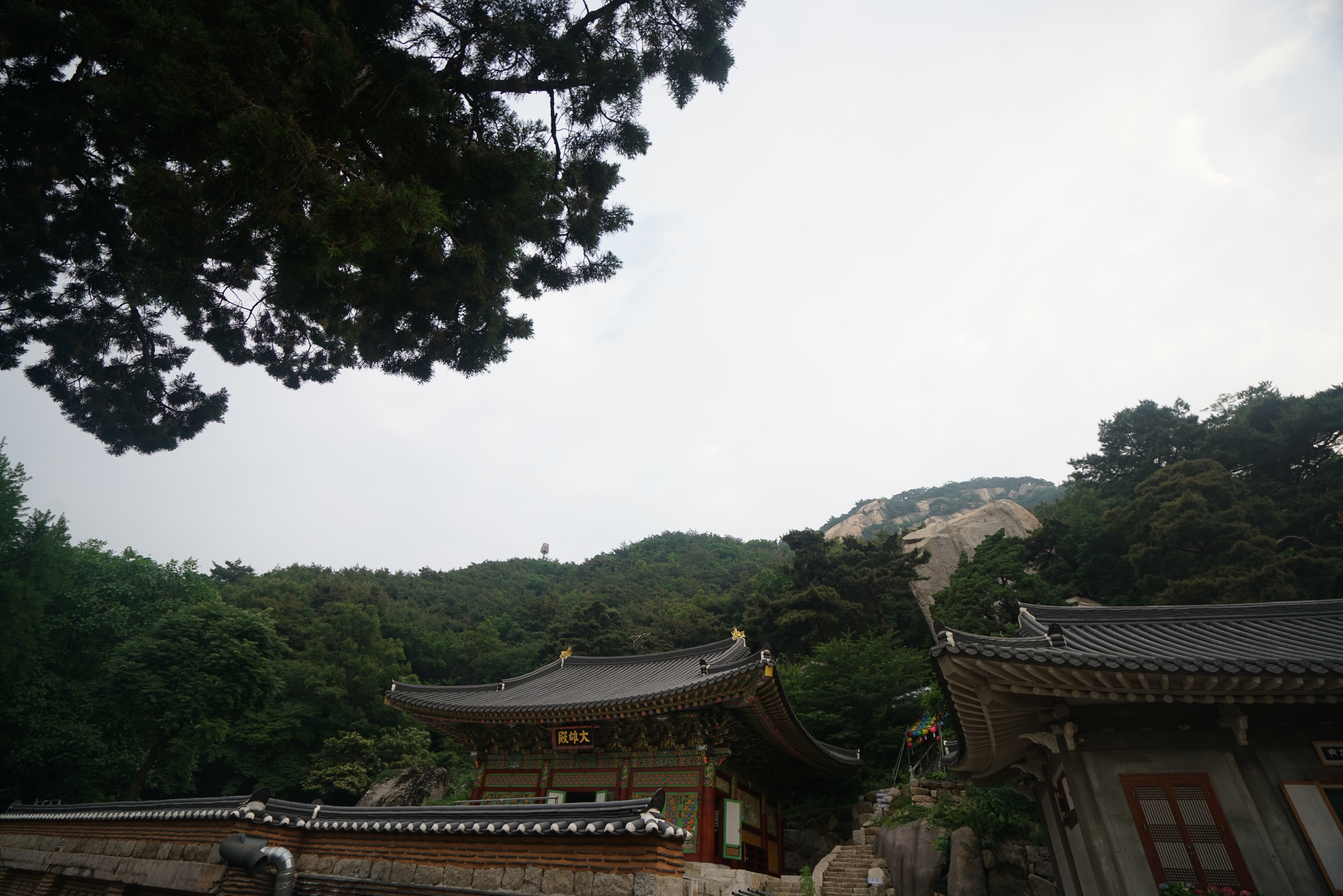 학도암 아침풍경